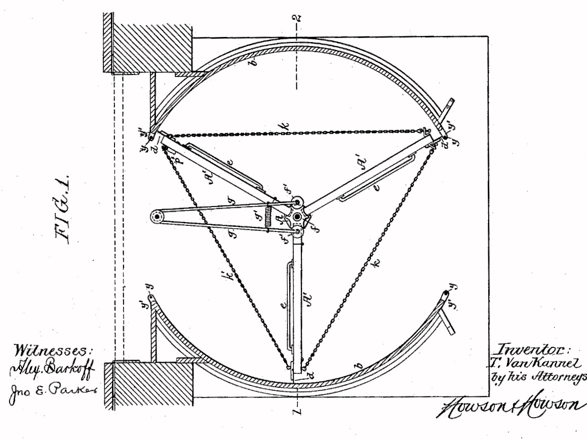 Technische Zeichnung der storm door von Theophilus van Kannel aus der Patentschrift zur Patentnummer 387571 vom 7. August 1888